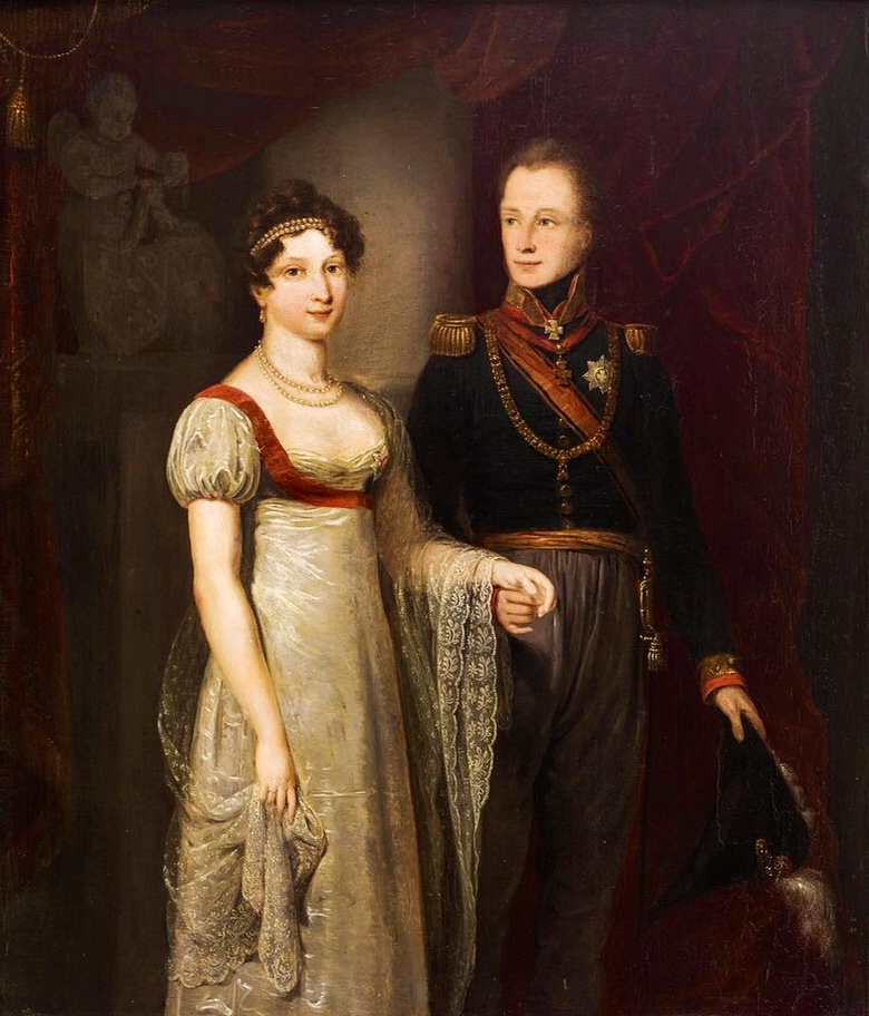 Dubbelportret van koning Willem II (1792-1849) en koningin Anna Paulowna (1795-1865) als kroonprinselijk paar // Double portrait of king William II (1792-1849) and queen Anna Paulowna (1795-1865) as crown prince and crown princess // Gemeentehuis Tilburg, Tilburg in bruikleen van Gemeentearchief Tilburg 1998